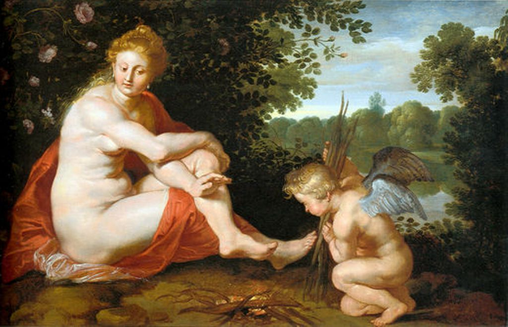 Latin: Sine Cerere et Baccho friget VenusSine Baccho et Cenere friget Venustitle QS:P1476,la:"Sine Cerere et Baccho friget Venus" label QS:Lla,"Sine Cerere et Baccho friget Venus" label QS:Lru,"Без Вакха и Цереры Венера мерзнет" label QS:Lde,"Die frierende Venus"